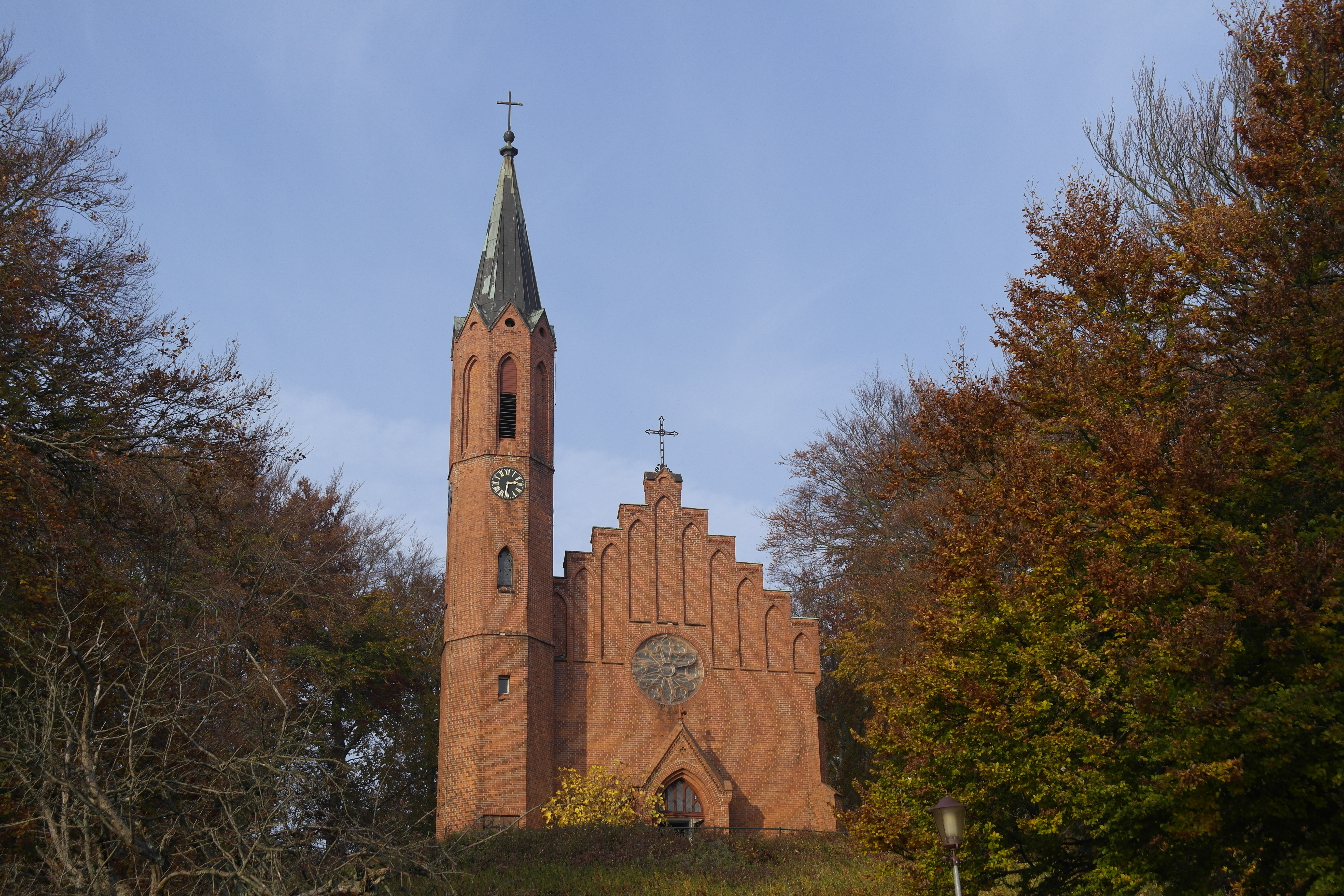 Kirche der ev. St.-Johannis-Gemeinde in Sassnitz auf Rügen